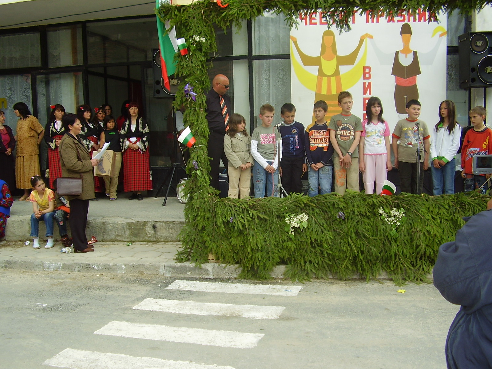 Празник в село Виево